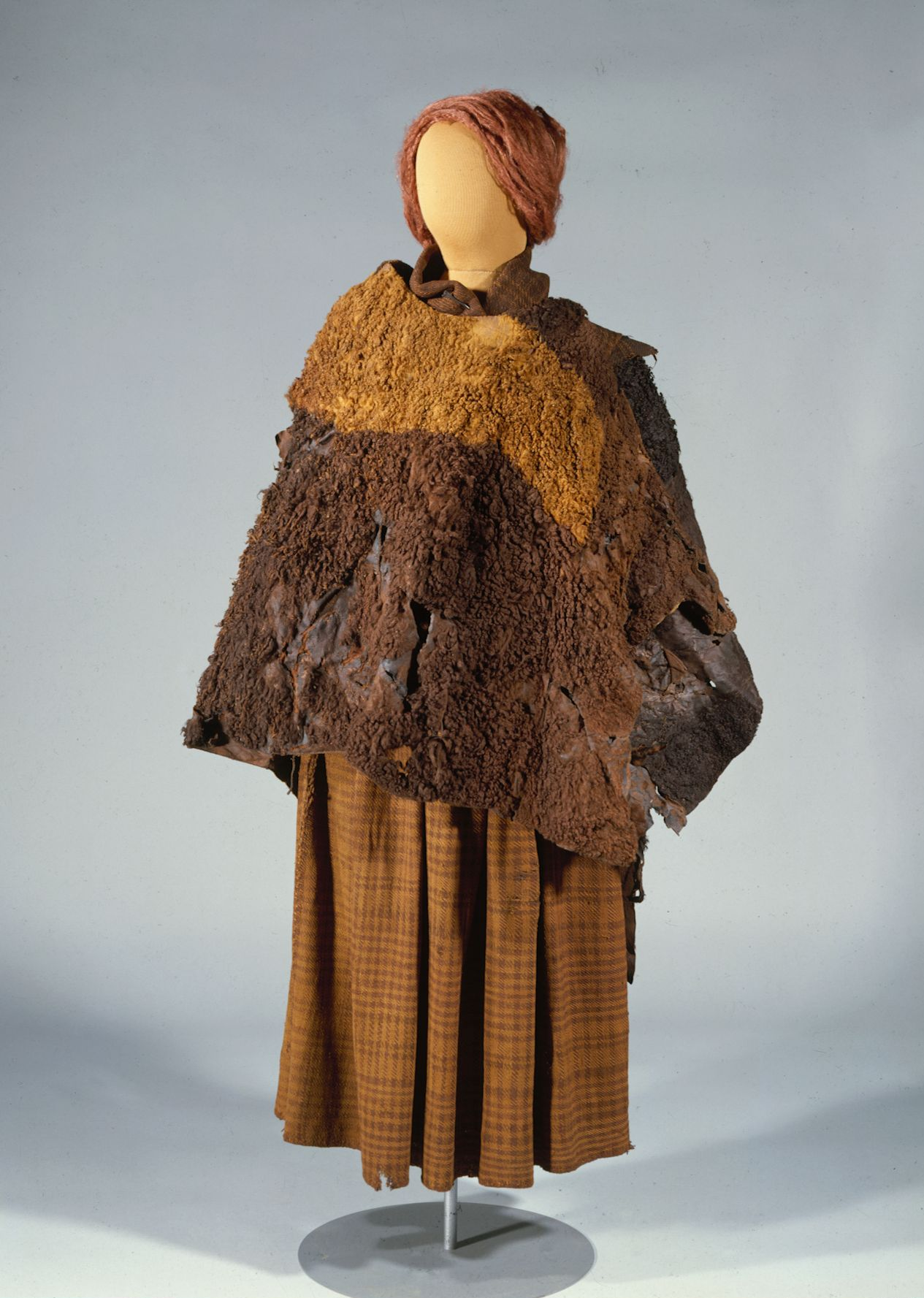 Kvindedragt fra Huldremosekvinden bestående af 2 skindslag + halsklæde og skørt af uld. Fra Huldremose, Ørum sogn. Fra nyopstilling, 1980